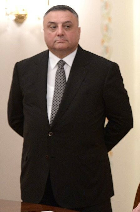 Владимир Путин провёл встречу с главами делегаций XIII заседания Совещания руководителей органов безопасности и разведывательных служб государств – участников Содружества Независимых Государств по вопросам разведывательной деятельности.